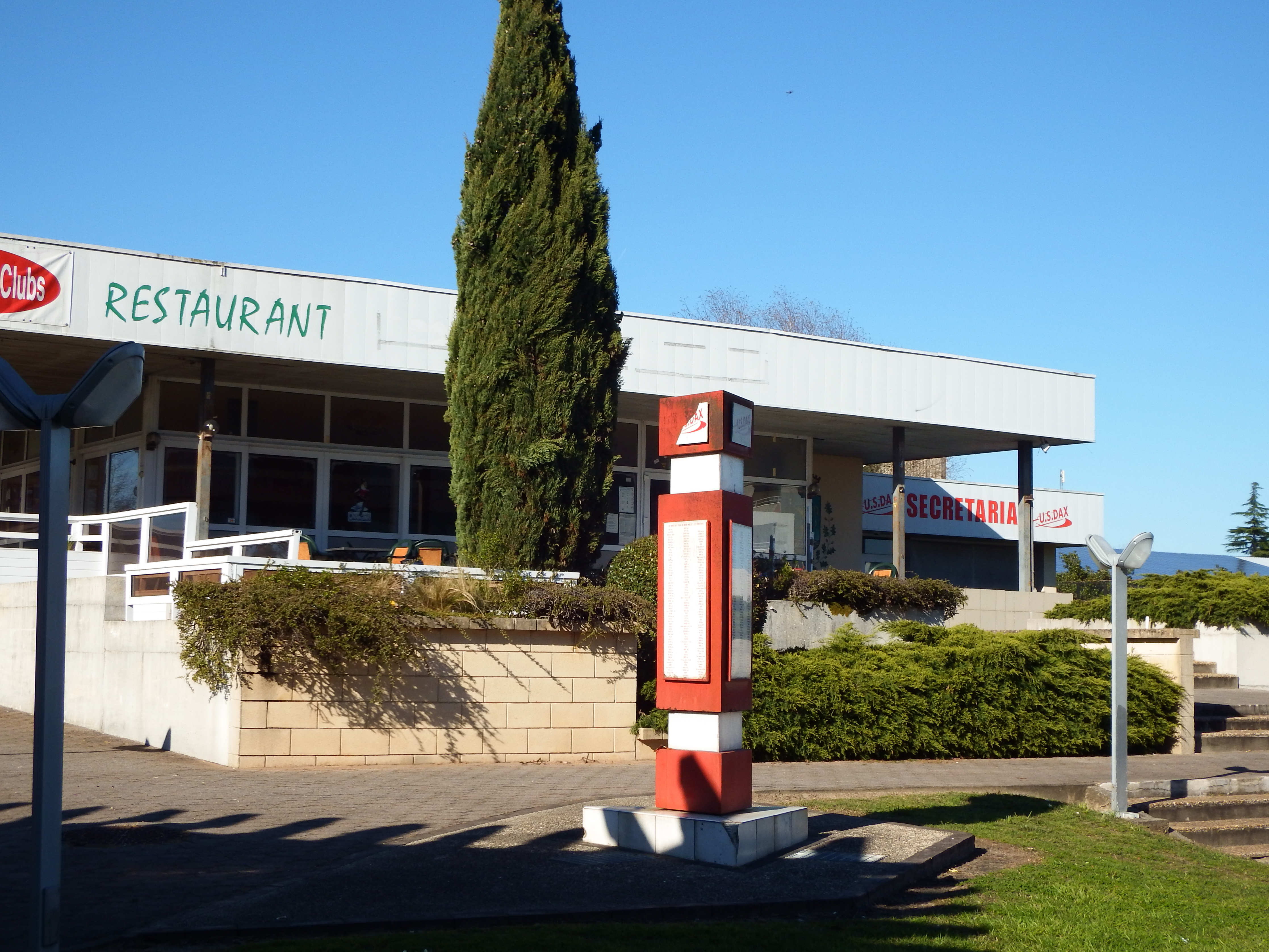 Bâtiment abritant le secrétariat de l'US Dax et un restaurant